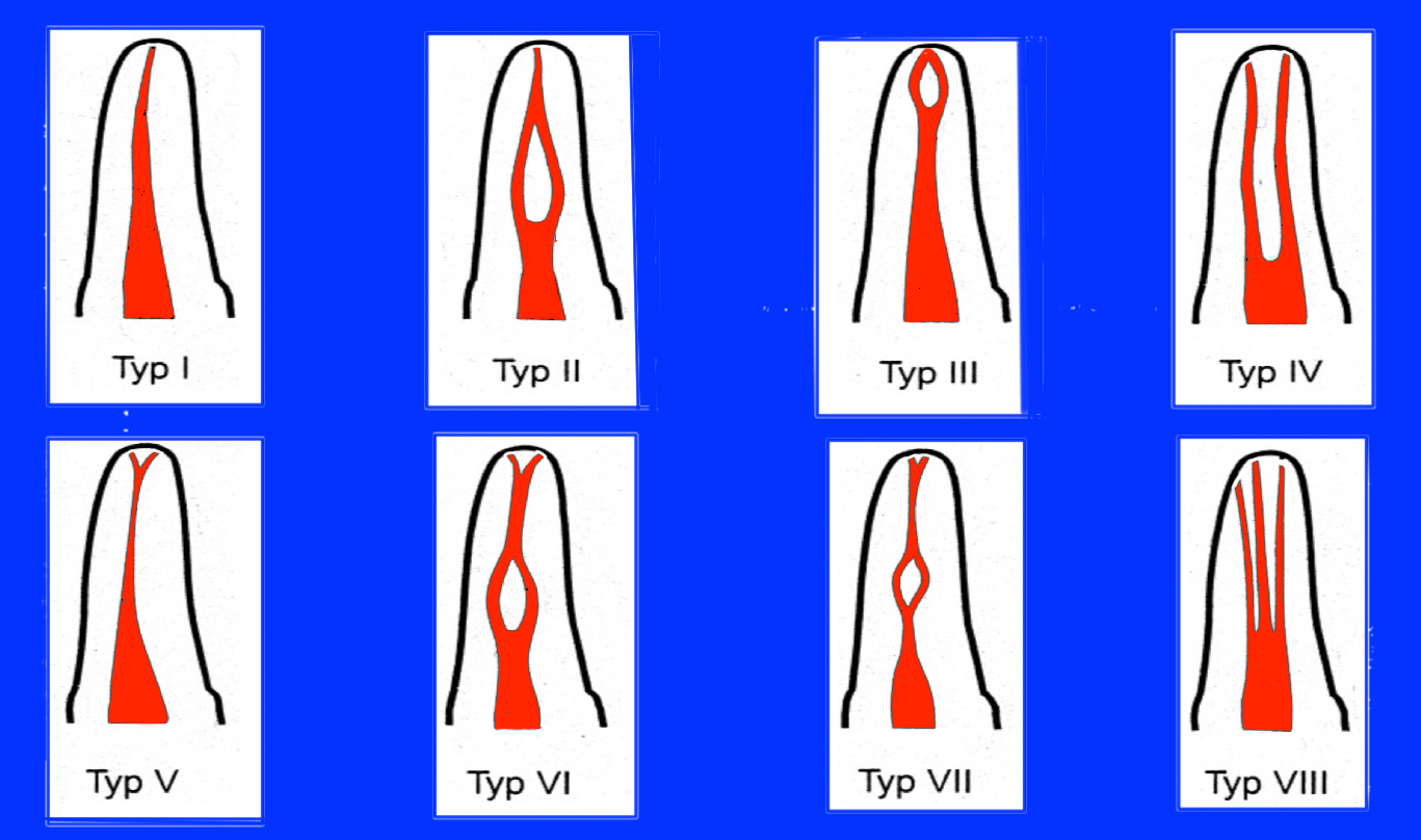 Vertucci Klasse I-VIII